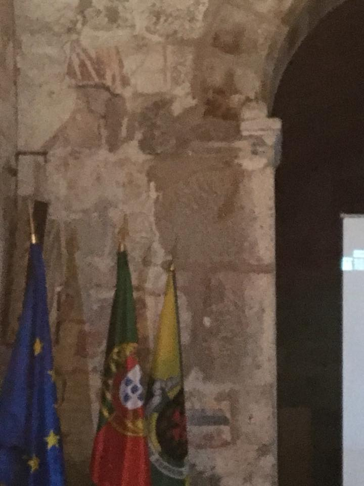 Pintura Humanista (séc XVI) Igreja de S. Pedro Fins de Ferreira_S. Brás (!?)_Arquidiocese de Braga_ D. Miguel da Silva, 1º comendatário.